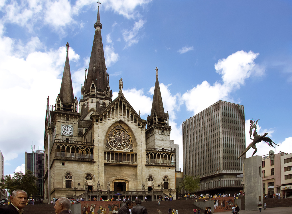 Conjunto de la Plaza de Bolivar de Manizales, con la Catedral Basílica de Manizales y el Monumento al Bolivar Cóndor